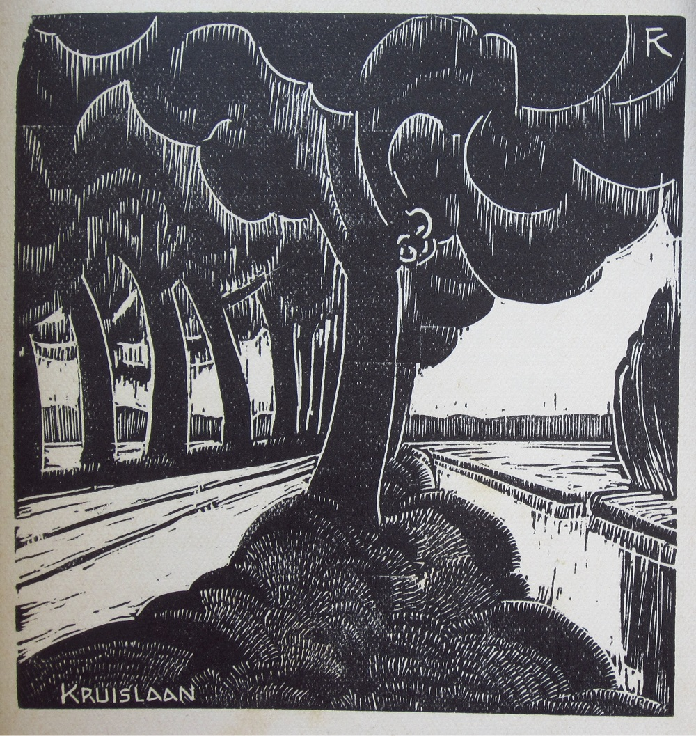 Fré Cohen (1903-1943), illustratie uit Hoogty (1926) — 'Kruislaan'